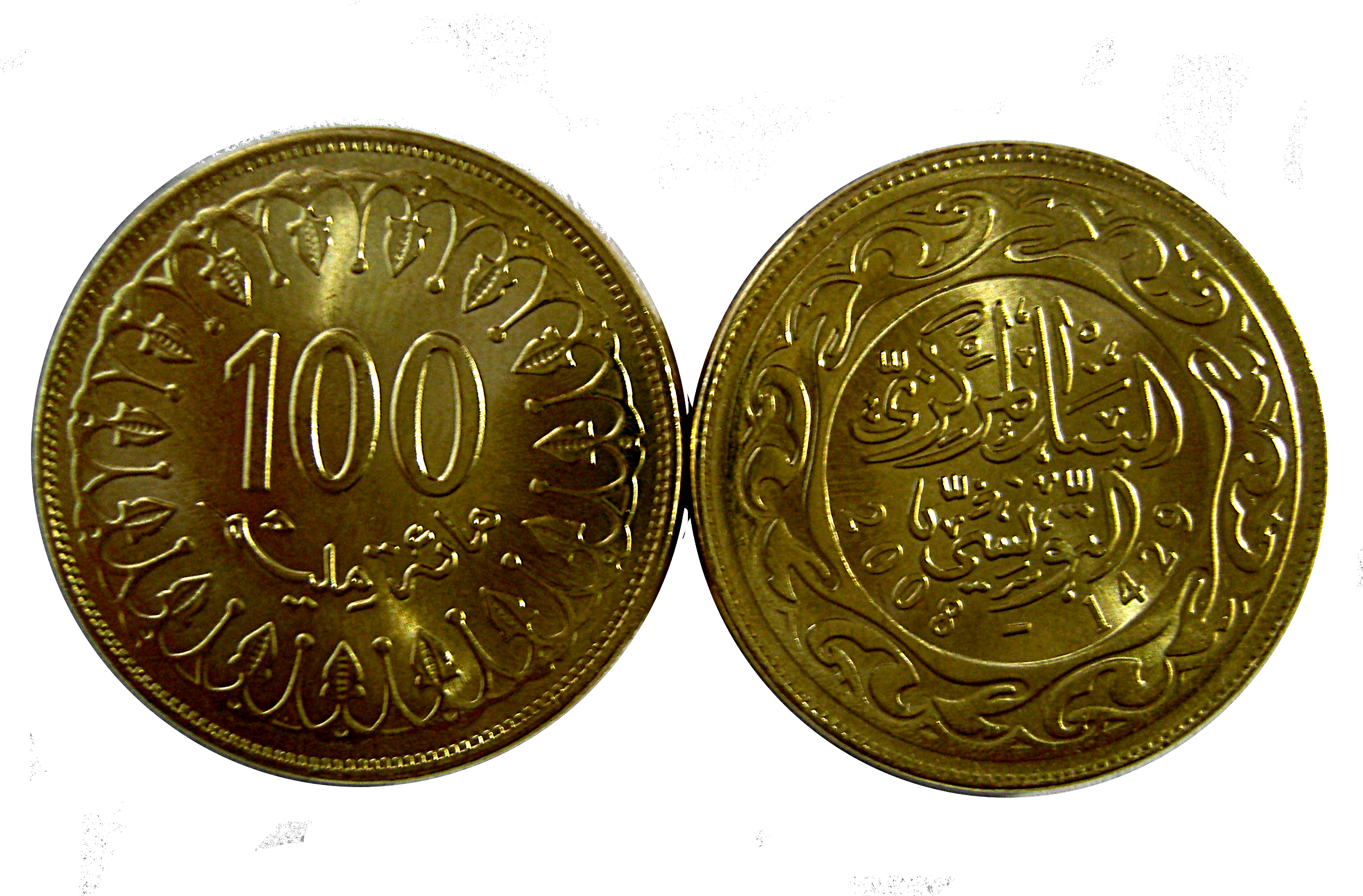 Deux pièces de monnaie de cent millimes (Tunisie)